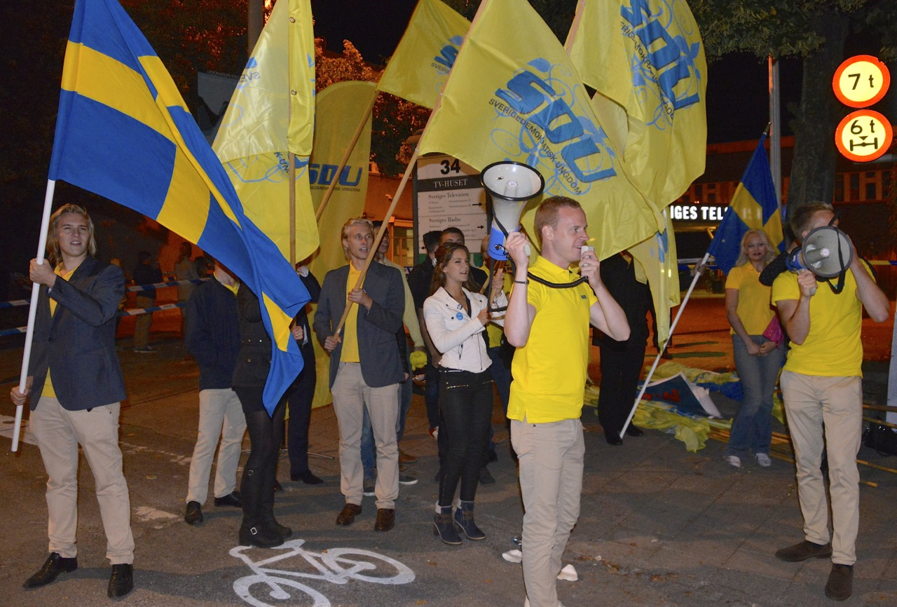 SDU, Sverigedemokratisk Ungdom, utanför SVT under slutdebatten den 12 september 2014.